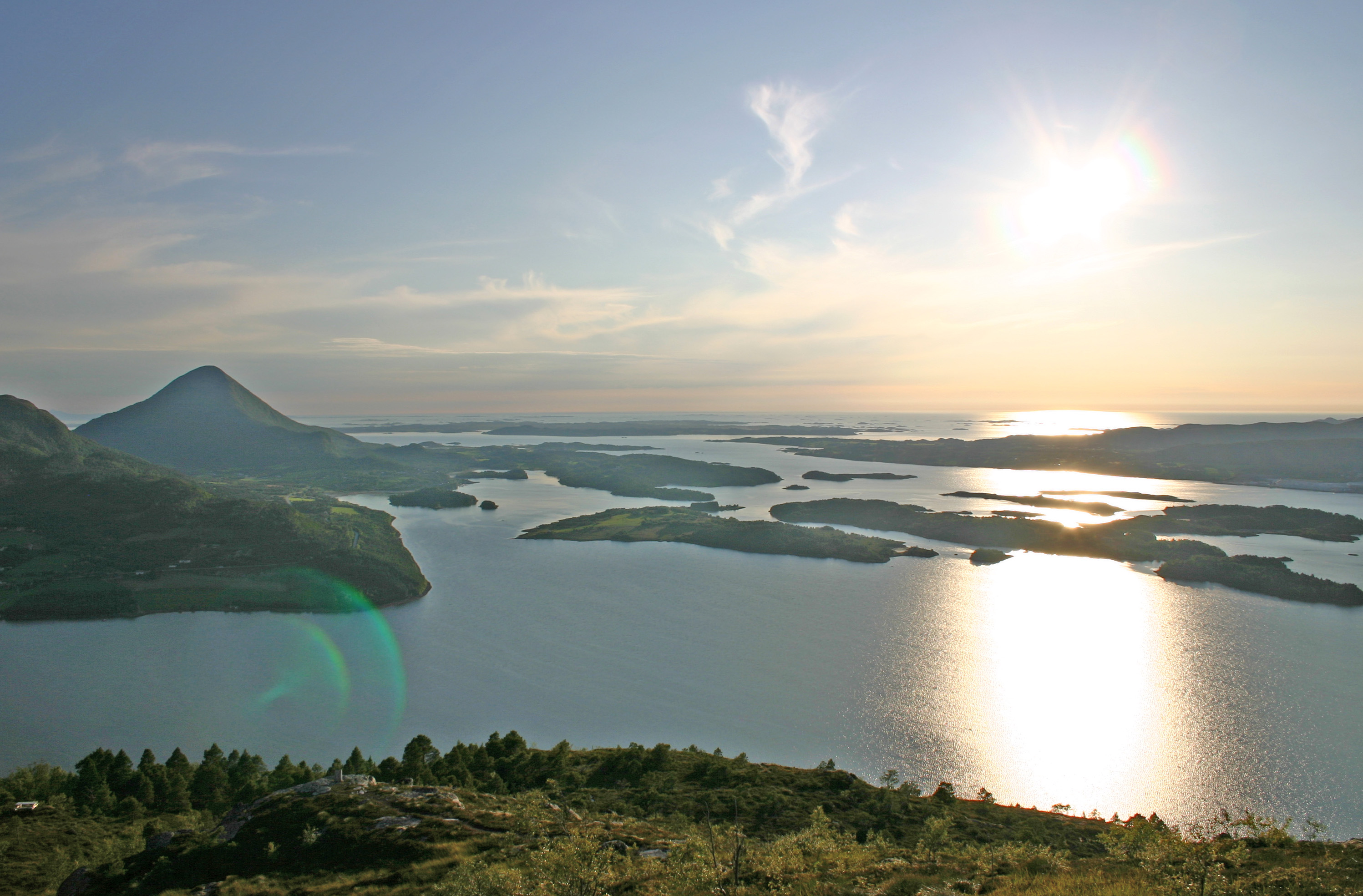 Utsikt fra fjellet